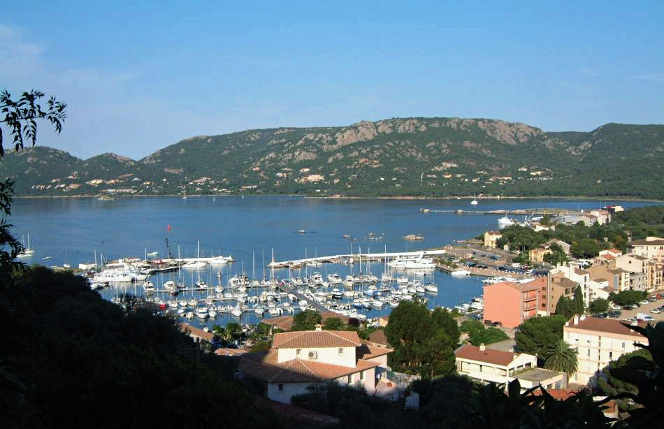 Le port de Porto-Vecchio en Corse du Sud